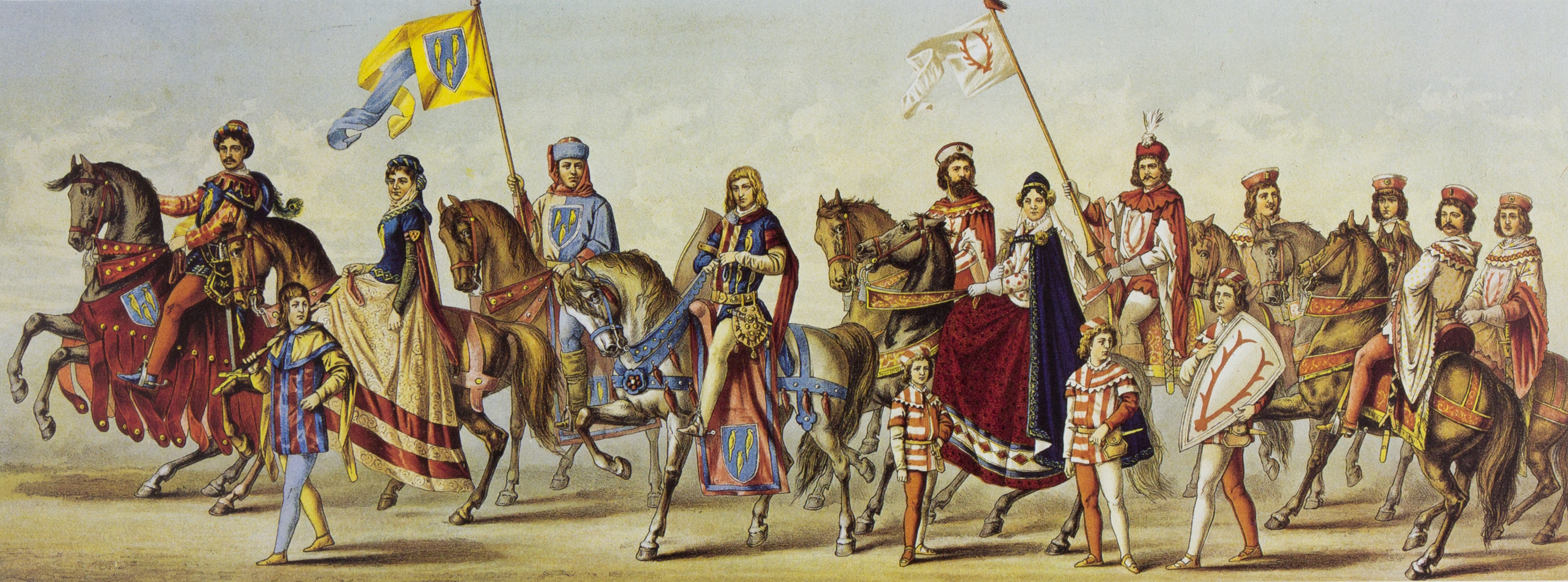 Tony Avenarius: Historischer Festzug veranstaltet bei der Feier der Vollendung des Kölner Doms am 18. October 1880. Tafel XI